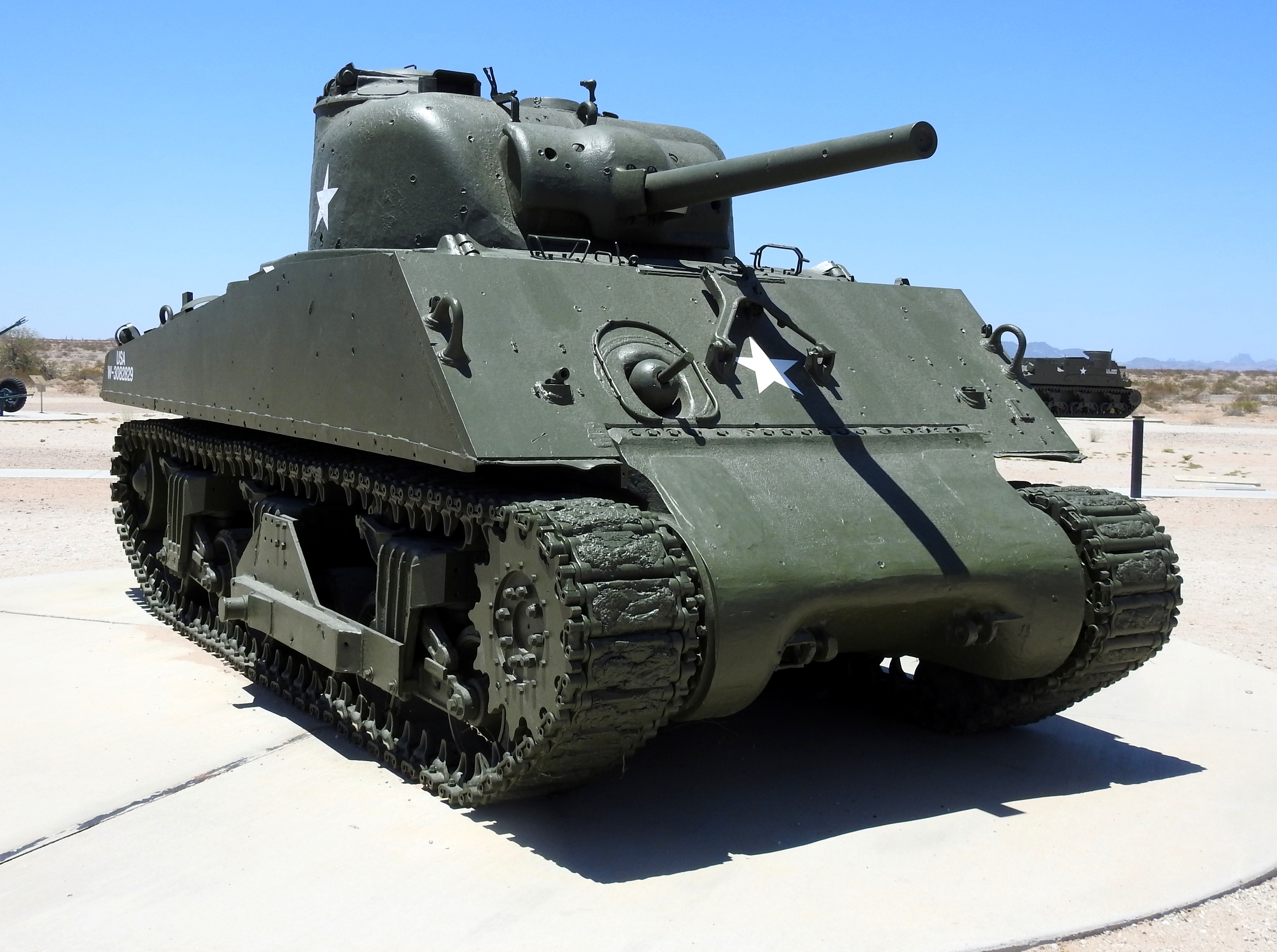 Sherman Medium Tank.